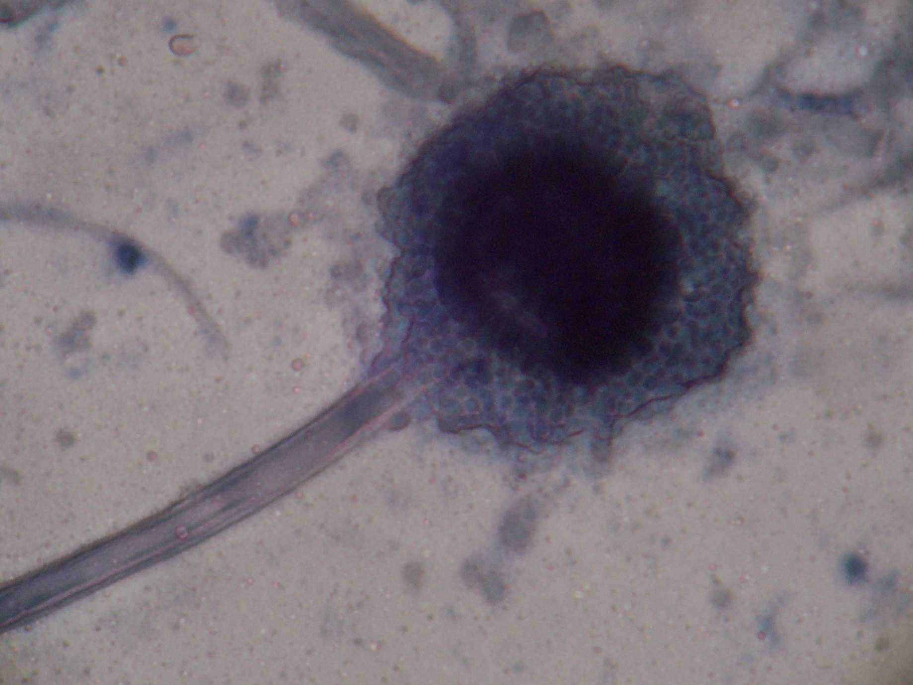 Conidiofora del hongo Aspergillum. (Microscopio de luz 40x)